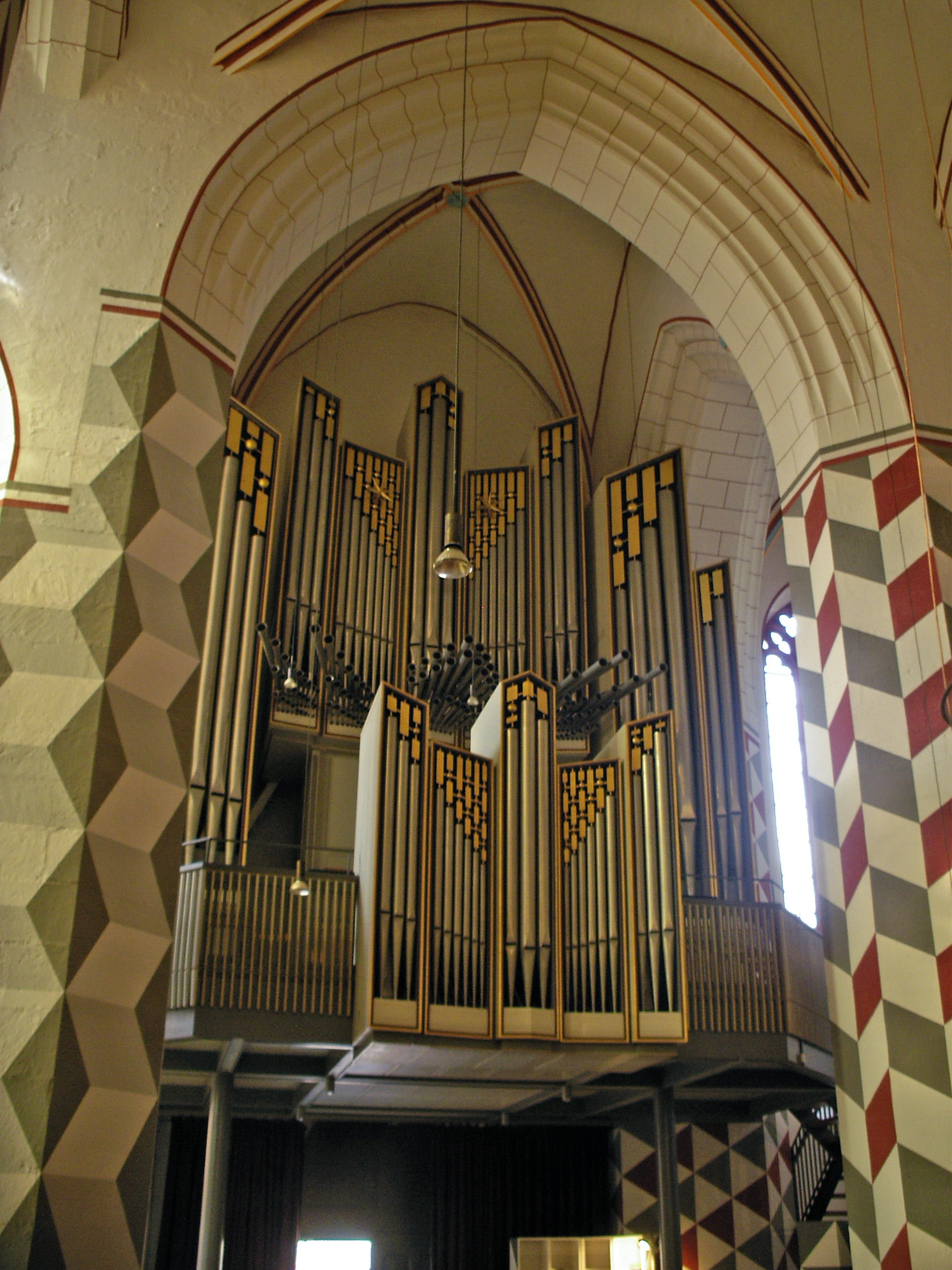 Orgel in St. Jacobi, Göttingen, Niedersachsen, Deutschland